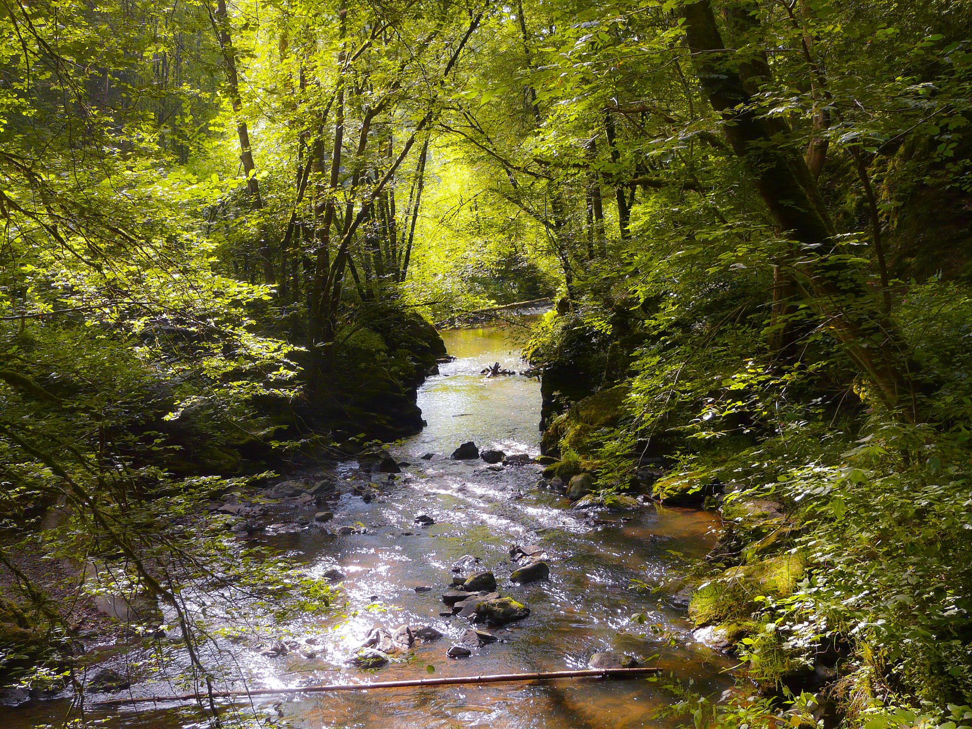 NSG-7231-002 Horngraben: Schlucht der Kleinen Kyll